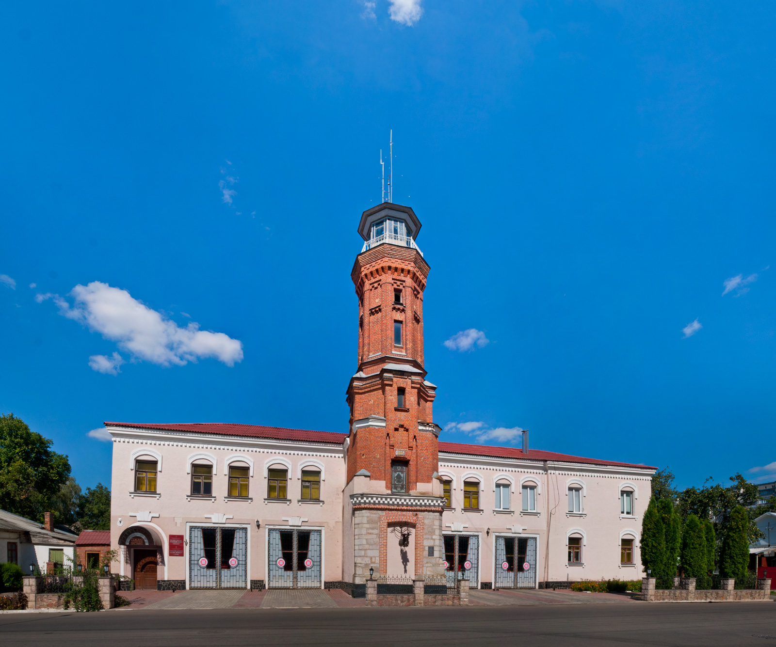 житомирська пожежна вежа, музей пожежної охорони